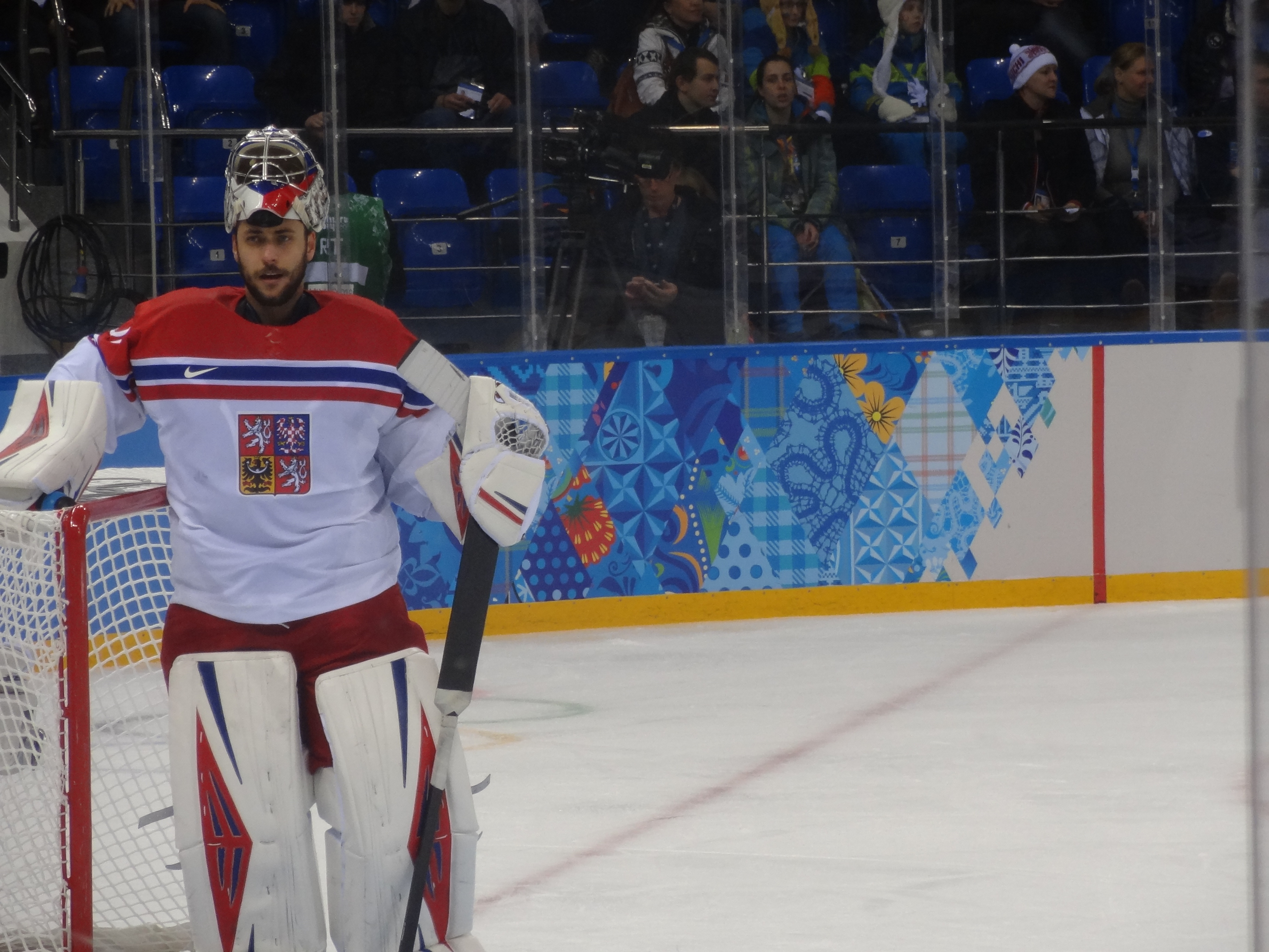 18 февраля 2014 года, Ледовая Арена "Шайба". Чехия - Словакия 5:3 (3:0, 1:1, 1:2)